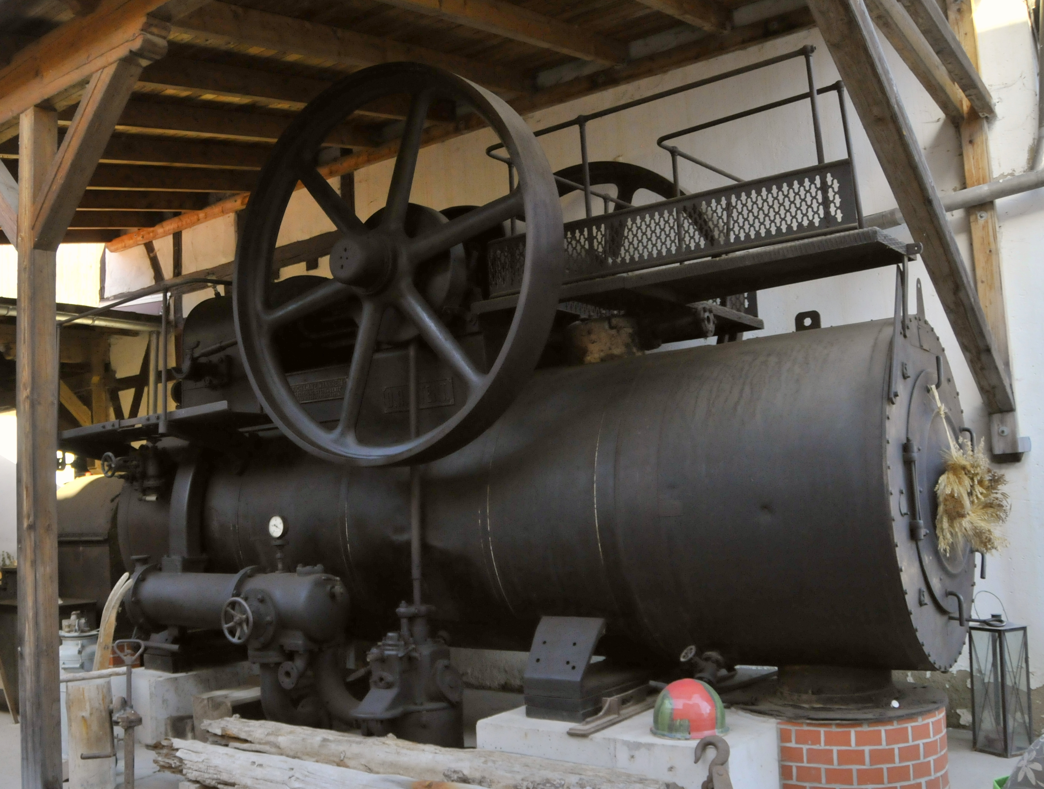 Kleinhettstedt, Senfmühle, Lokomobile